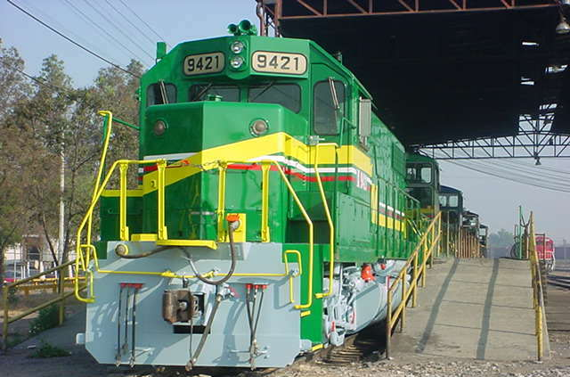 locomotora Ferrovalle en taller